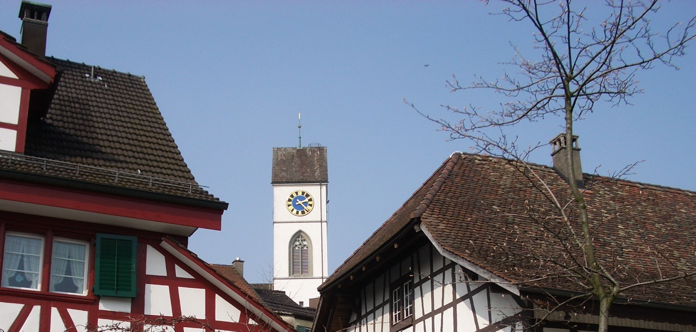 Dielsdorf ZH, Switzerland self-made, March 2007